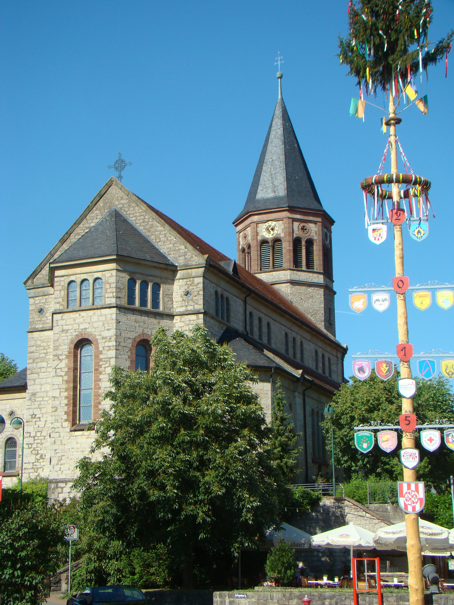 Alte Kilianskirche in Assamstadt (heute Gemeindezentrum)